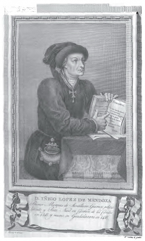 Retrato de Iñigo López de Mendoza, Primer Marqués de Santillana.